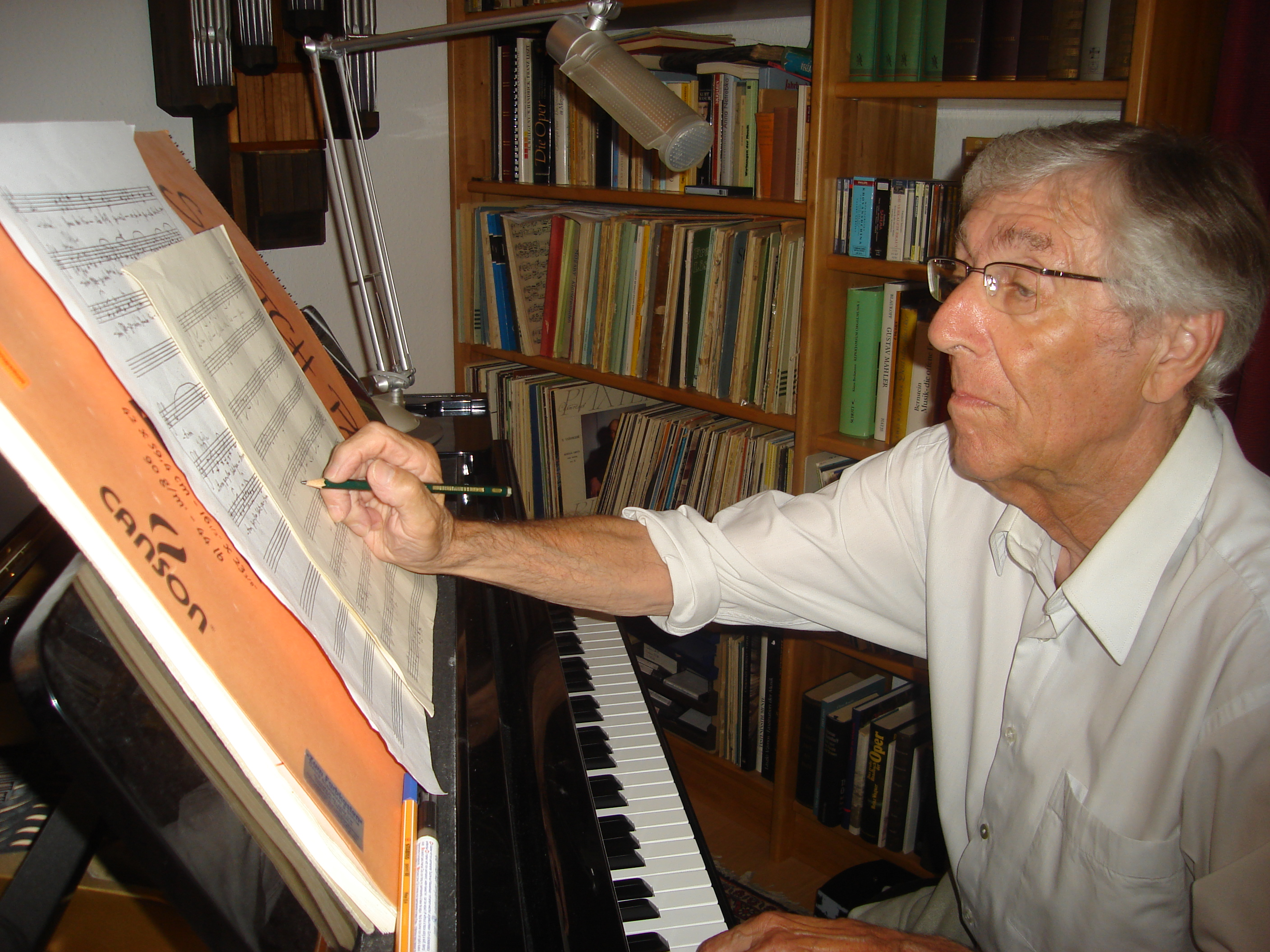 Portrait des Komponisten